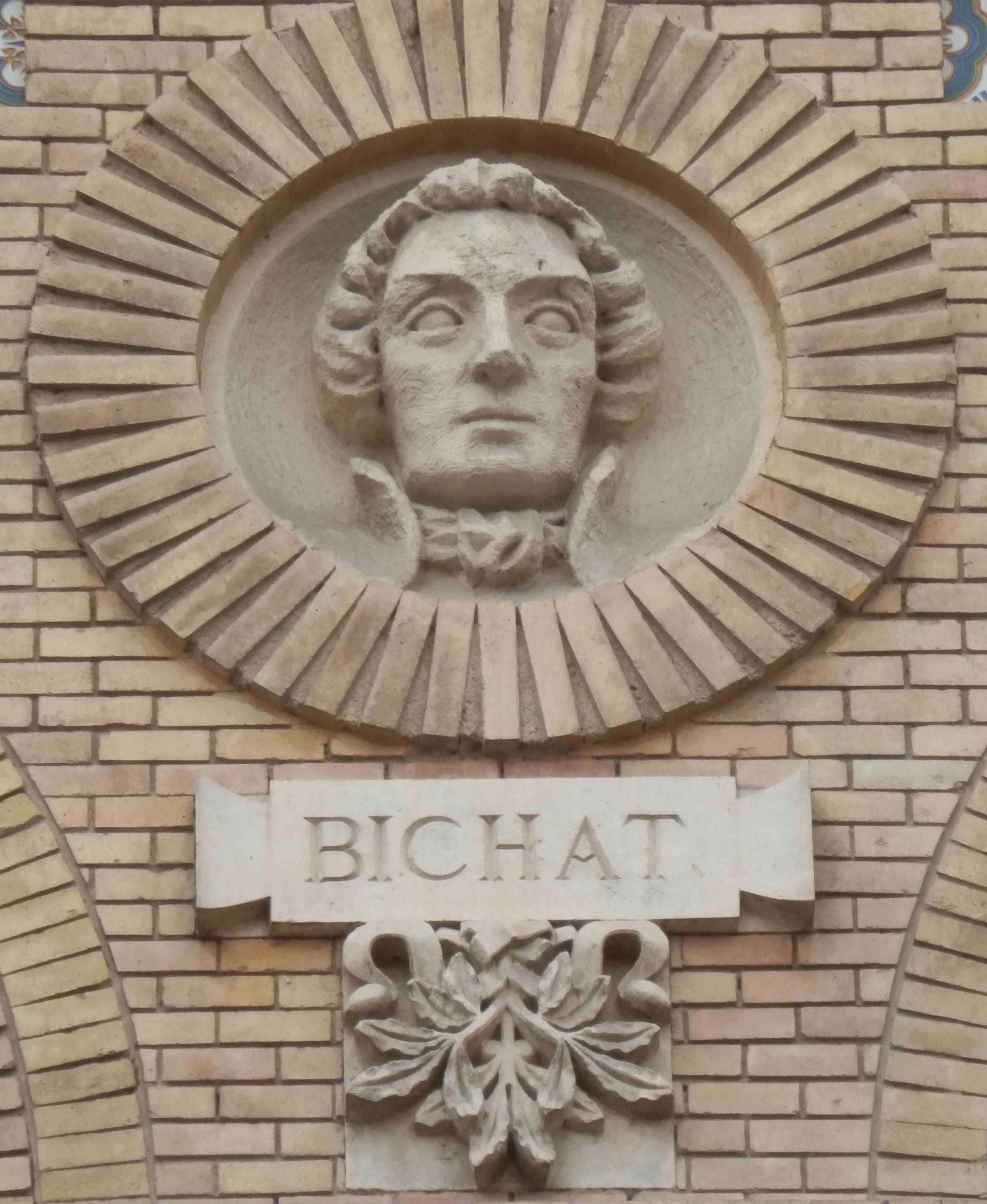 Estatua dedicada a Xavier Bichat en el Paraninfo de la Universidad de Zaragoza (Antigua Facultad de Medicina).